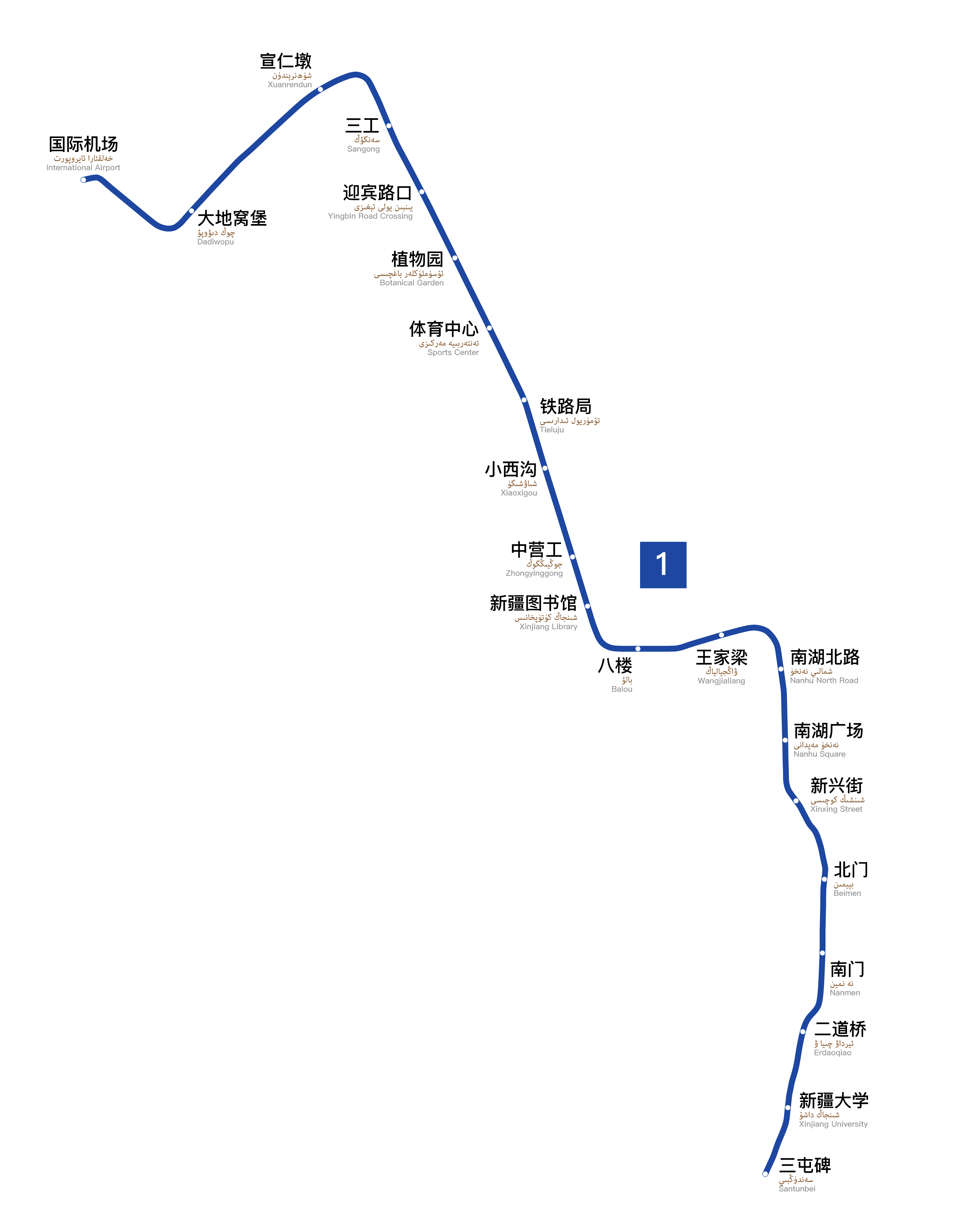 中文（中国大陆）: 乌鲁木齐地铁线路示意图，浅色为在建线路